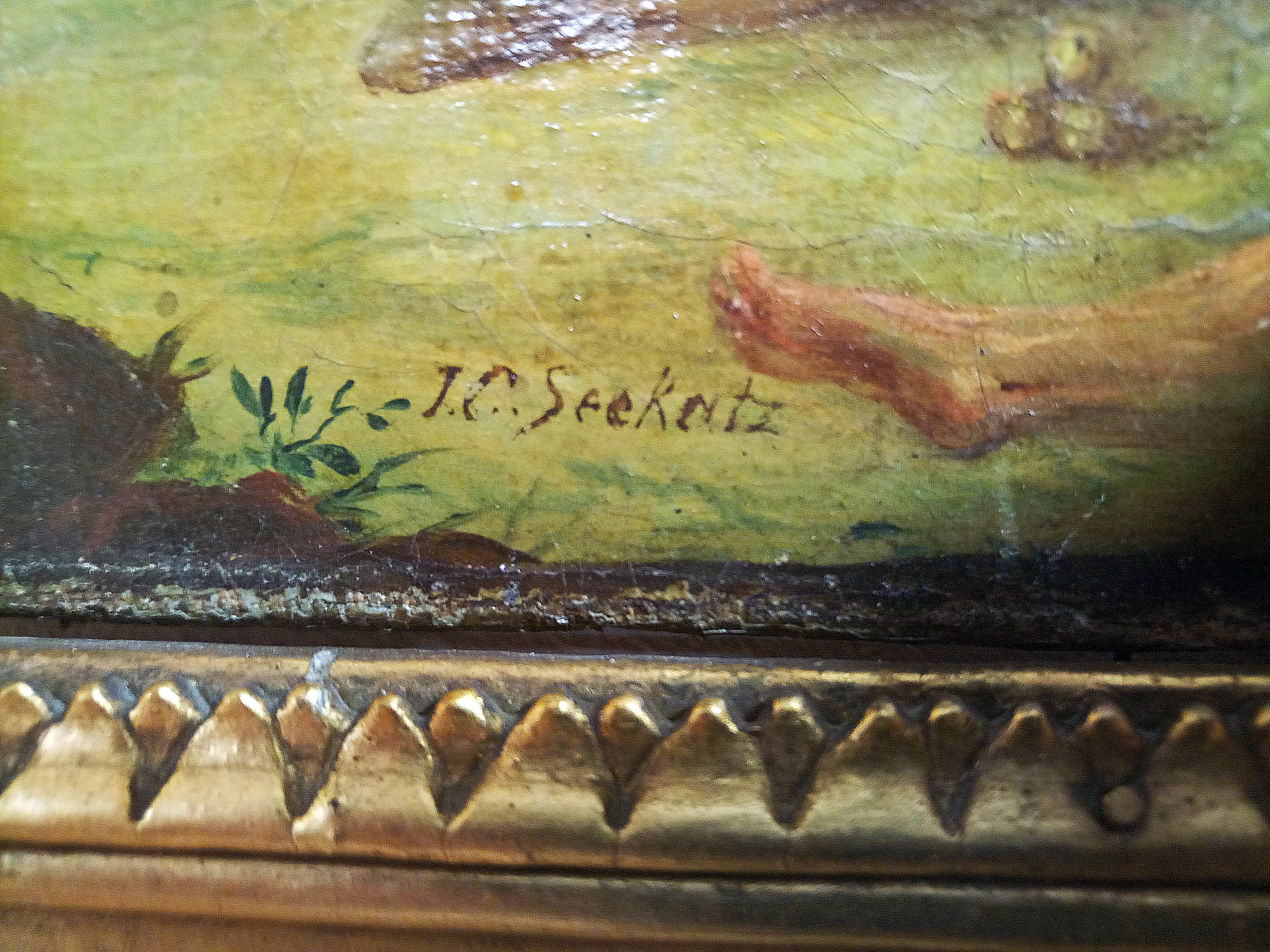 Johann Conrad Seekatz (1719-1768), Signatur auf dem Bild Karten spielender Kinder, Stadtmuseum Grünstadt